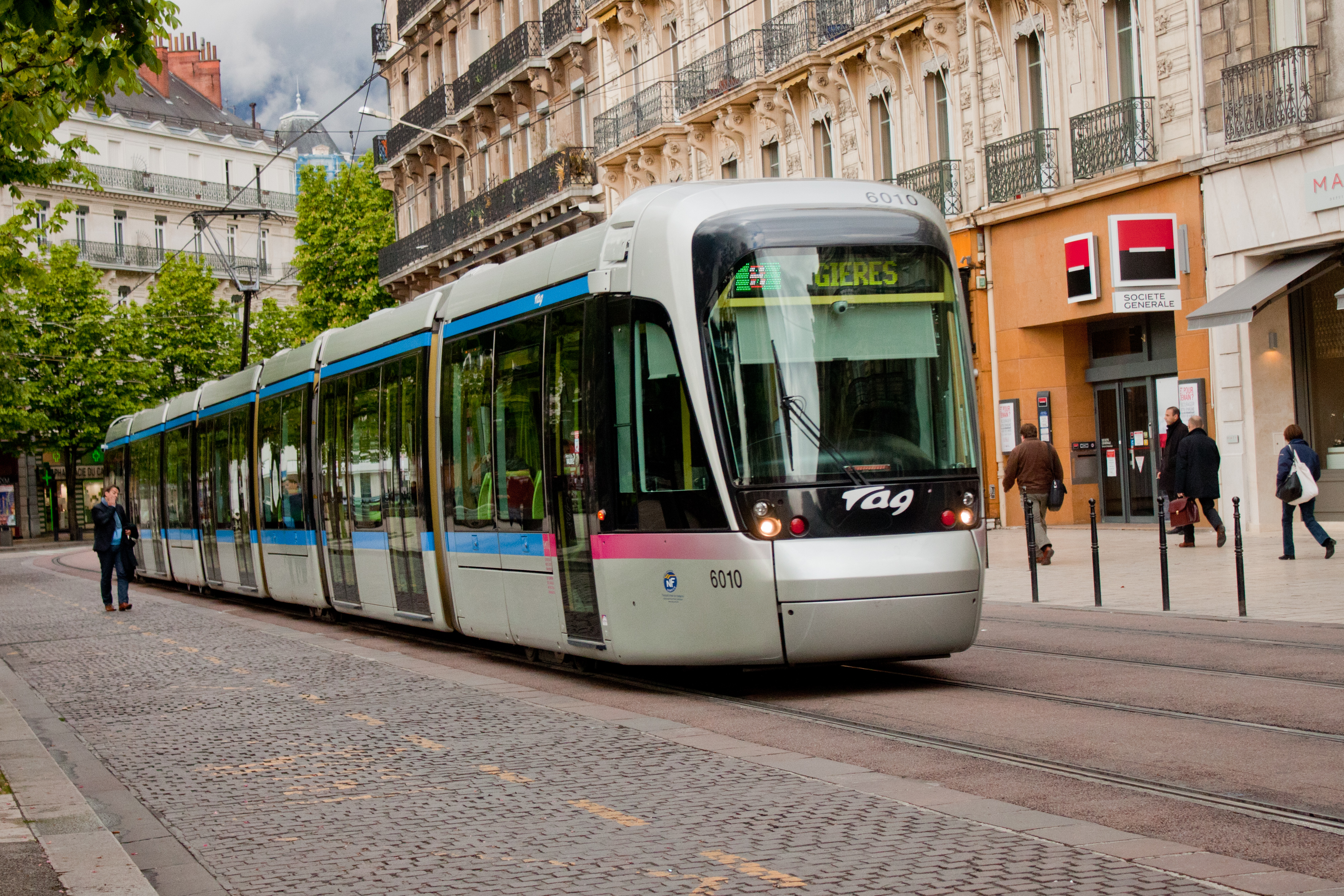 Un Citatis de la TAG (Grenoble), juste avant son arrivée à l'arrêt Victor Hugo